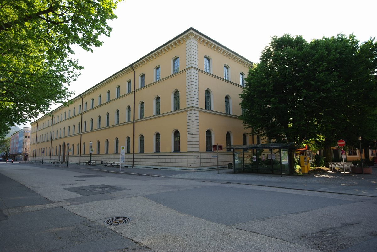 Salinenstr. 1, Bad Reichenhall (Beamtenstock)This is a photograph of an architectural monument.